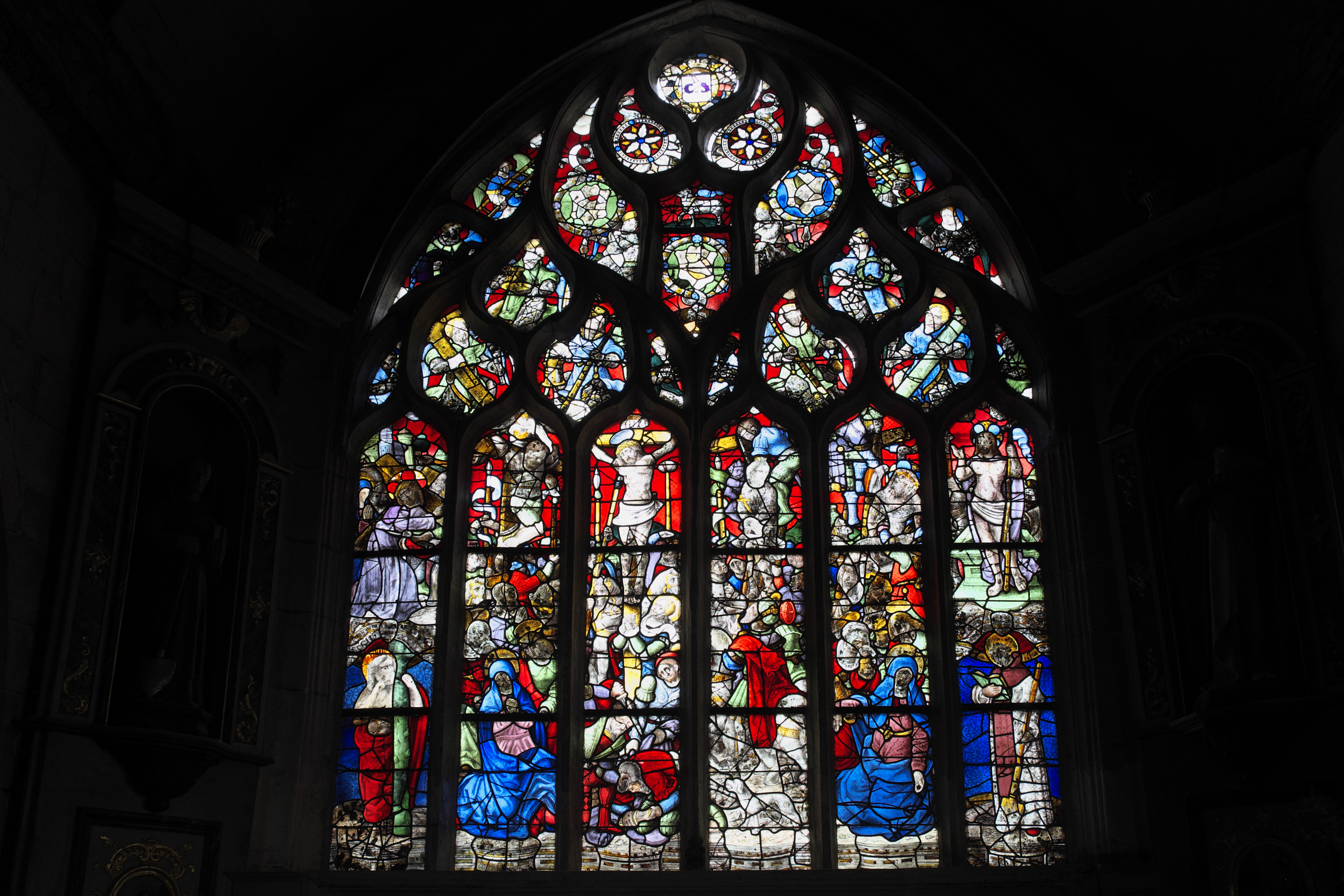 Katholische Kirche Saint-Fiacre in Guengat im Département Finistère (Region Bretagne/Frankreich), Bleiglasfenster (baie 0) um 1550; Darstellung: Szenen der Passion Christi; rechts unten: heiliger Fiacrius